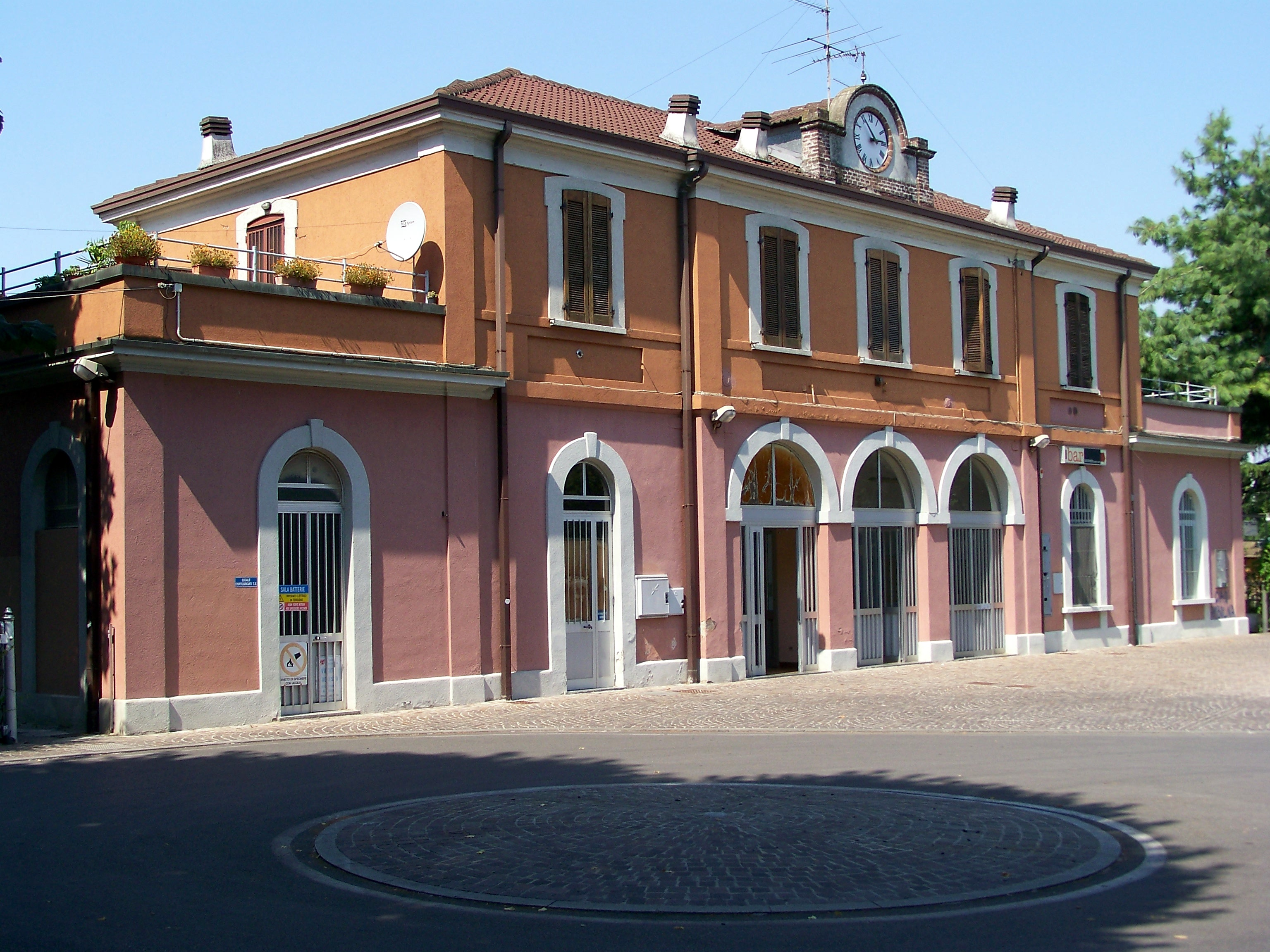 Lato ferrovia del fabbricato viaggiatori della Stazione di Manerbio sulla ferrovia Brescia-Cremona.